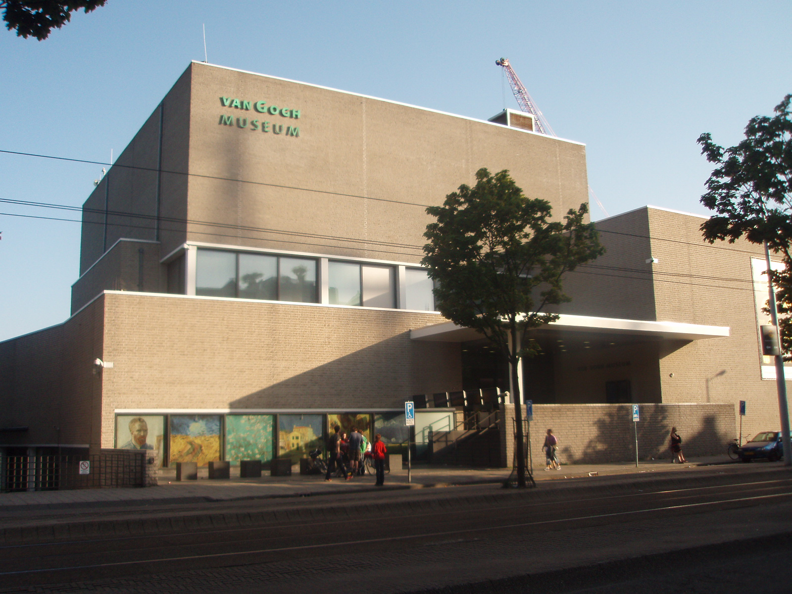 Zicht op een deel van de oude entree van het Van Gogh Museum in Amsterdam